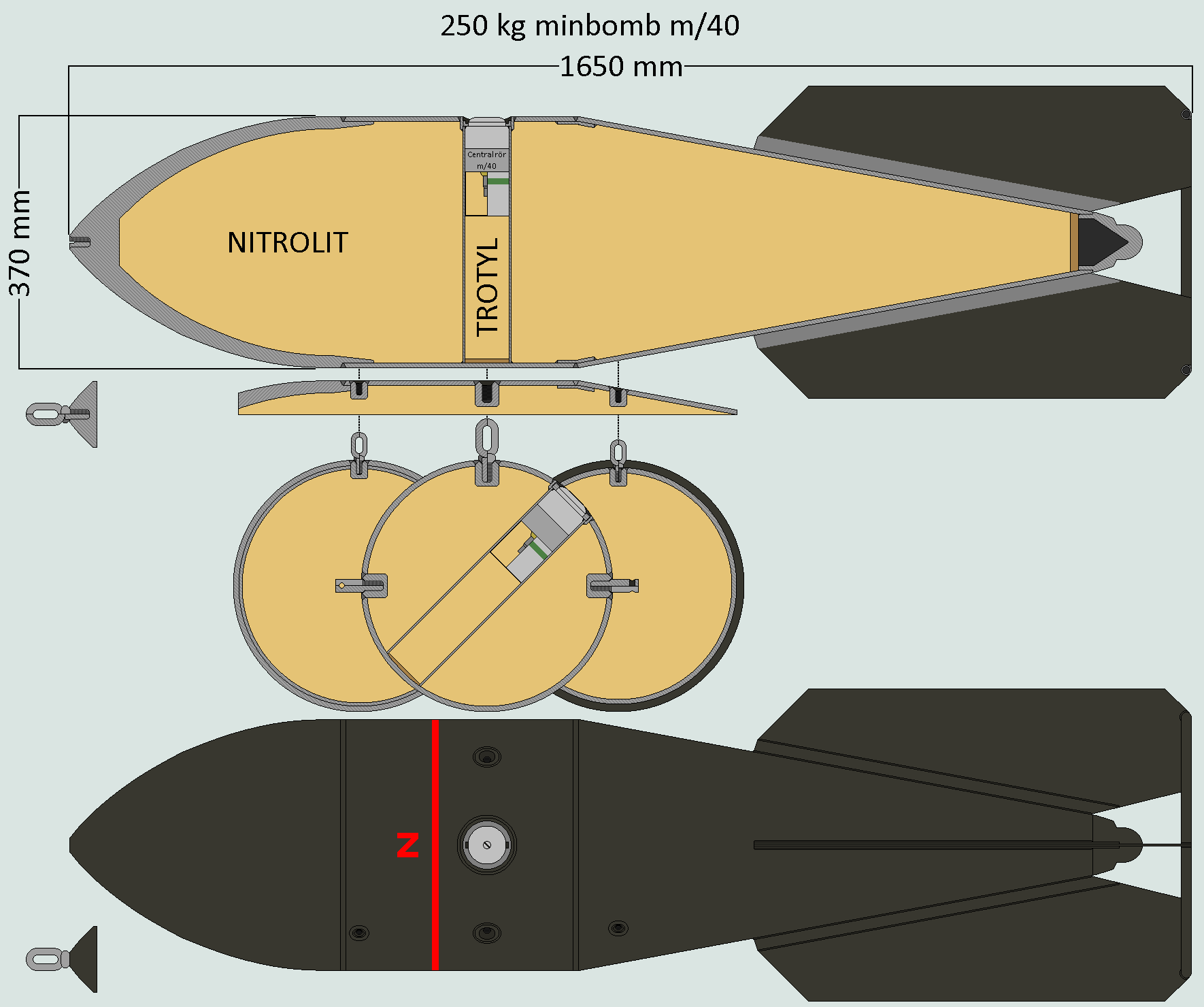 Ritning av 250 kg minbomb m/40.